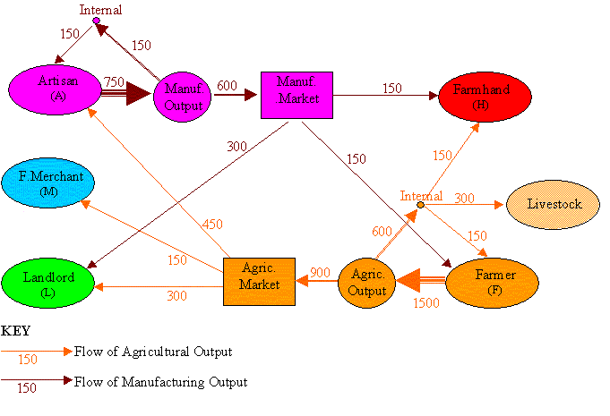 Economic tableau